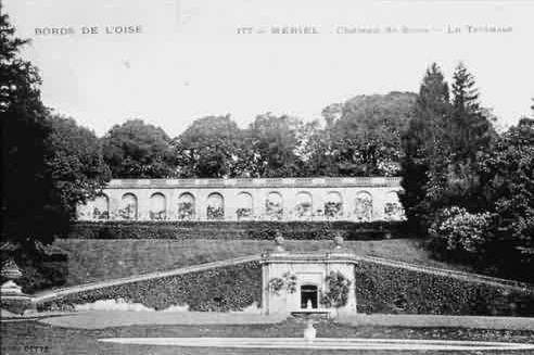 Terrasses de Stors, carte postale ancienne